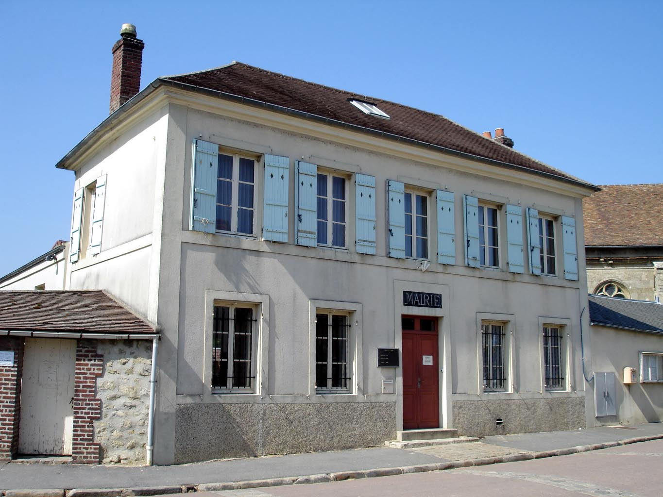 Mairie de Villiers-le-Sec (Val-d'Oise), France